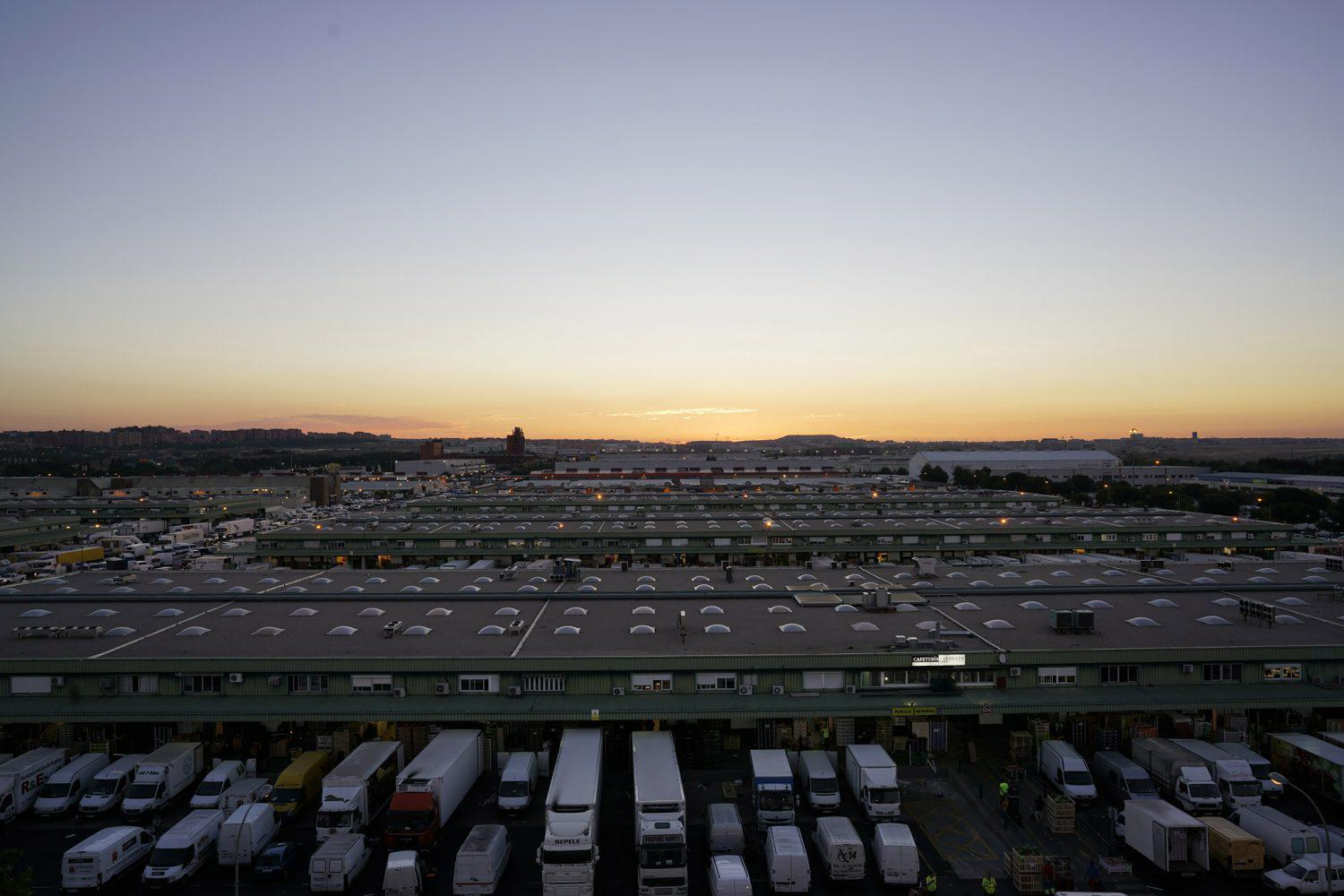 El próximo 30 de noviembre se cumplen 35 años desde que se iniciara la actividad comercial en Mercamadrid, con la inauguración del Mercado Central de Pescados, al que se sumaría tres meses después el Mercado Central de Frutas y Hortalizas. Treinta y cinco años en los que se han ido incorporando y modernizando naves e instalaciones, así como innovando en los servicios prestados a los clientes, como la digitalización de los servicios, un nuevo sistema de gestión de residuos, o la iluminación LED del recinto con sistema de telegestión punto a punto. Todo, para convertirse en una de las Unidades Alimentarias más importantes del mundo, reconocida y estudiada en los cinco continentes.